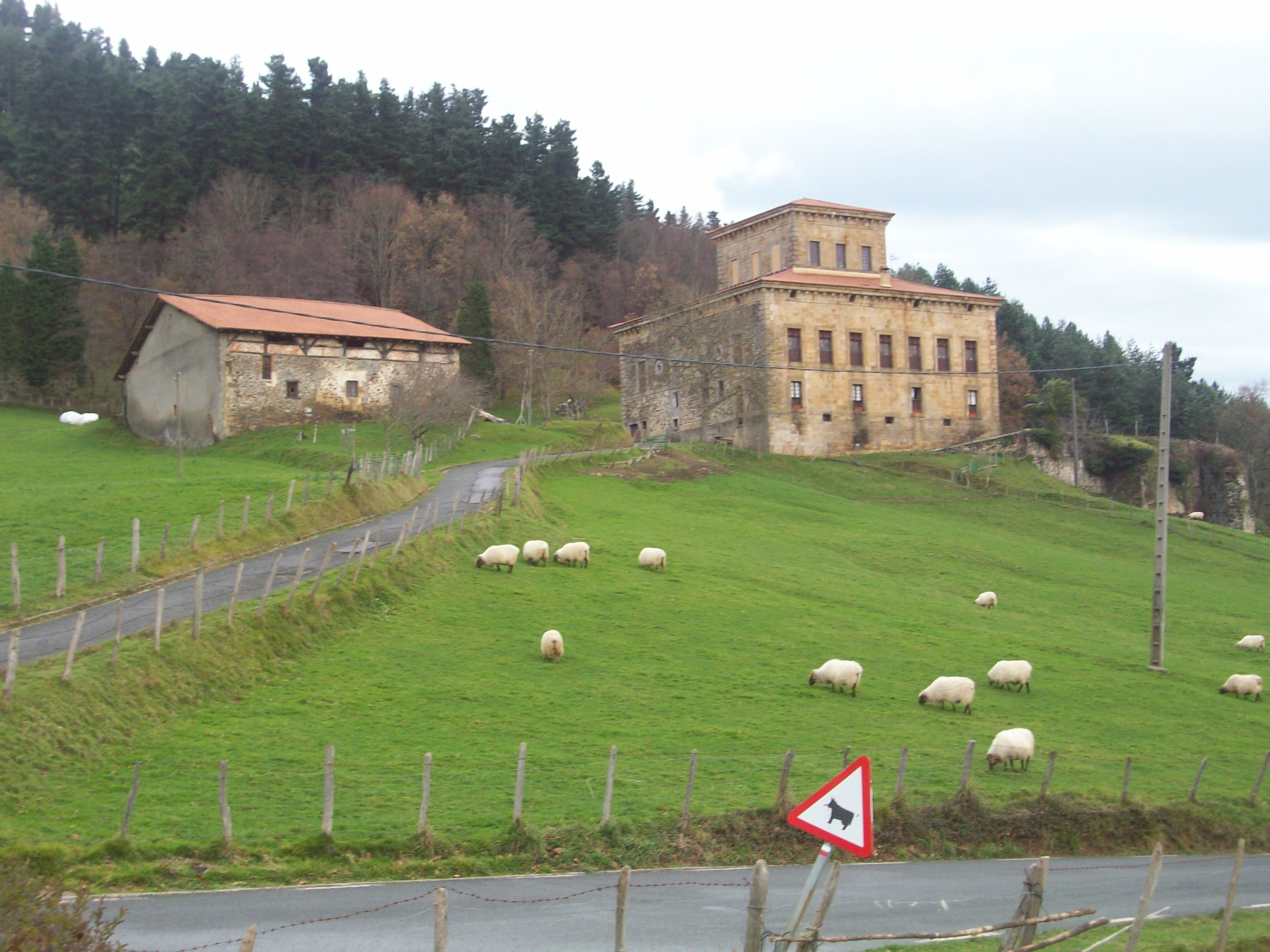 Irimo mendiaren magalean dagoen Ipeñarrieta jauregia. Urretxu, Gipuzkoa. Euskal Herria.